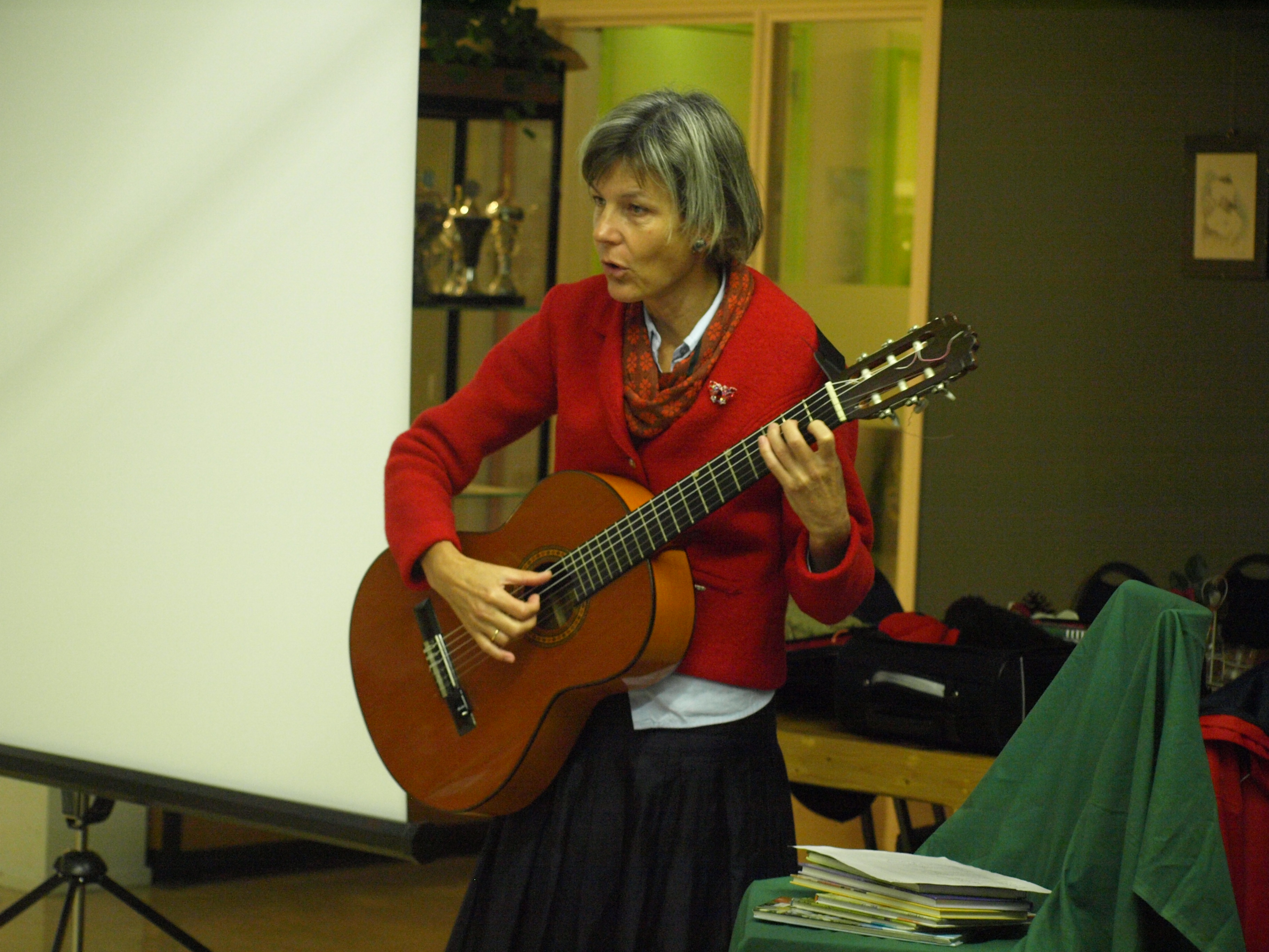 Evelien van Dort op de Driester in de Kamperzeekdijk en de Ichthus in Genemuiden